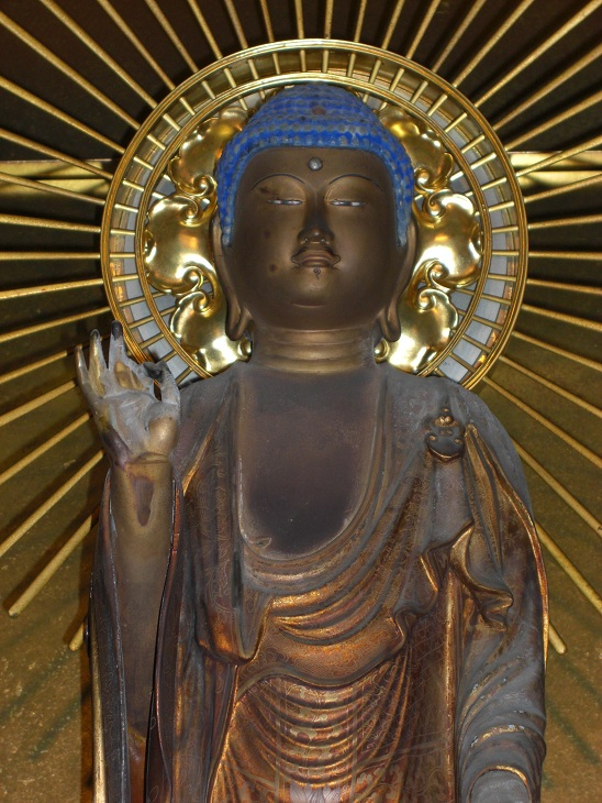 家康支援による相良大沢創建以来の本尊。度重なる火災､地震から難を逃れている